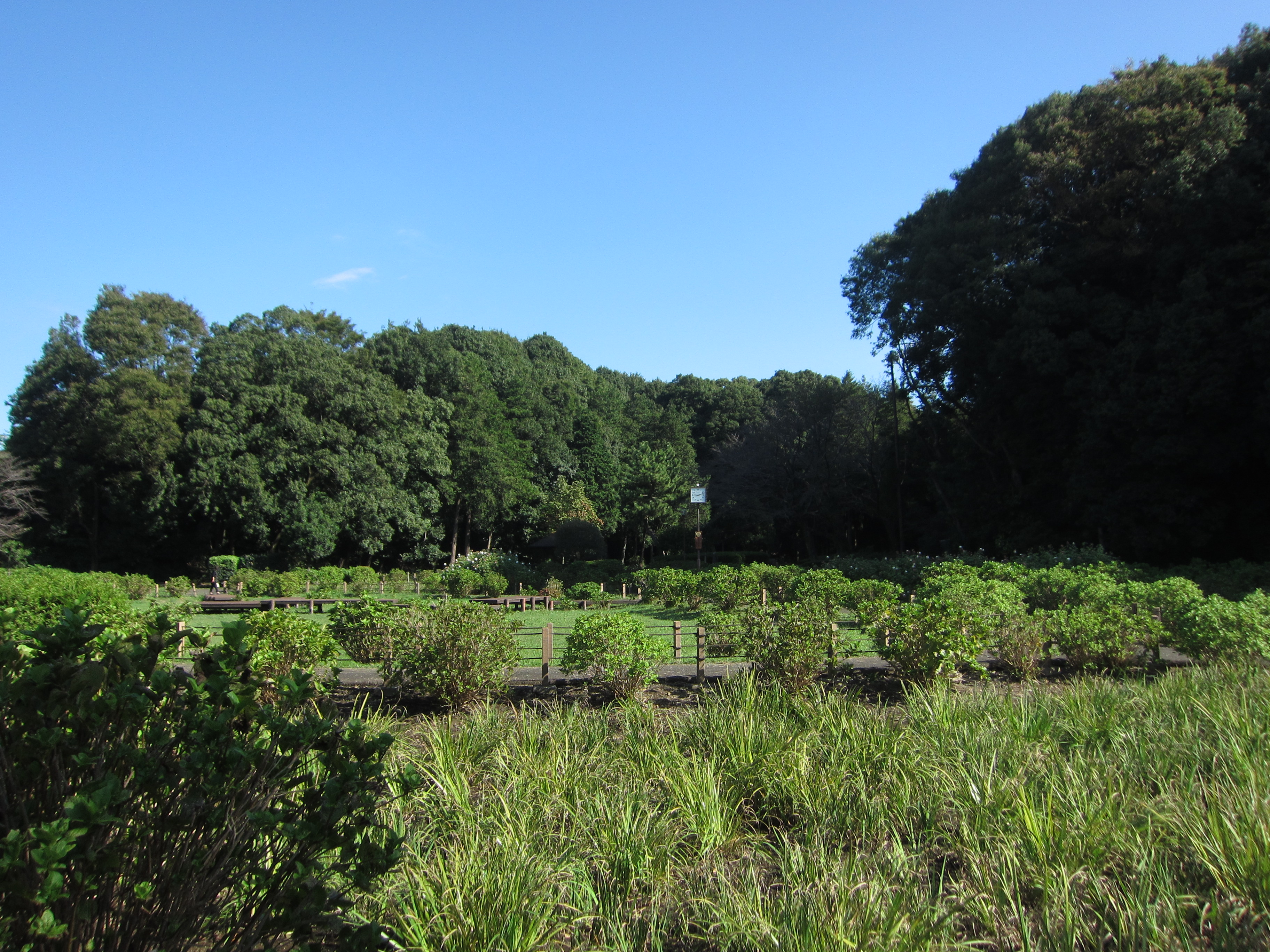 芹沢公園の湿性植物コーナー